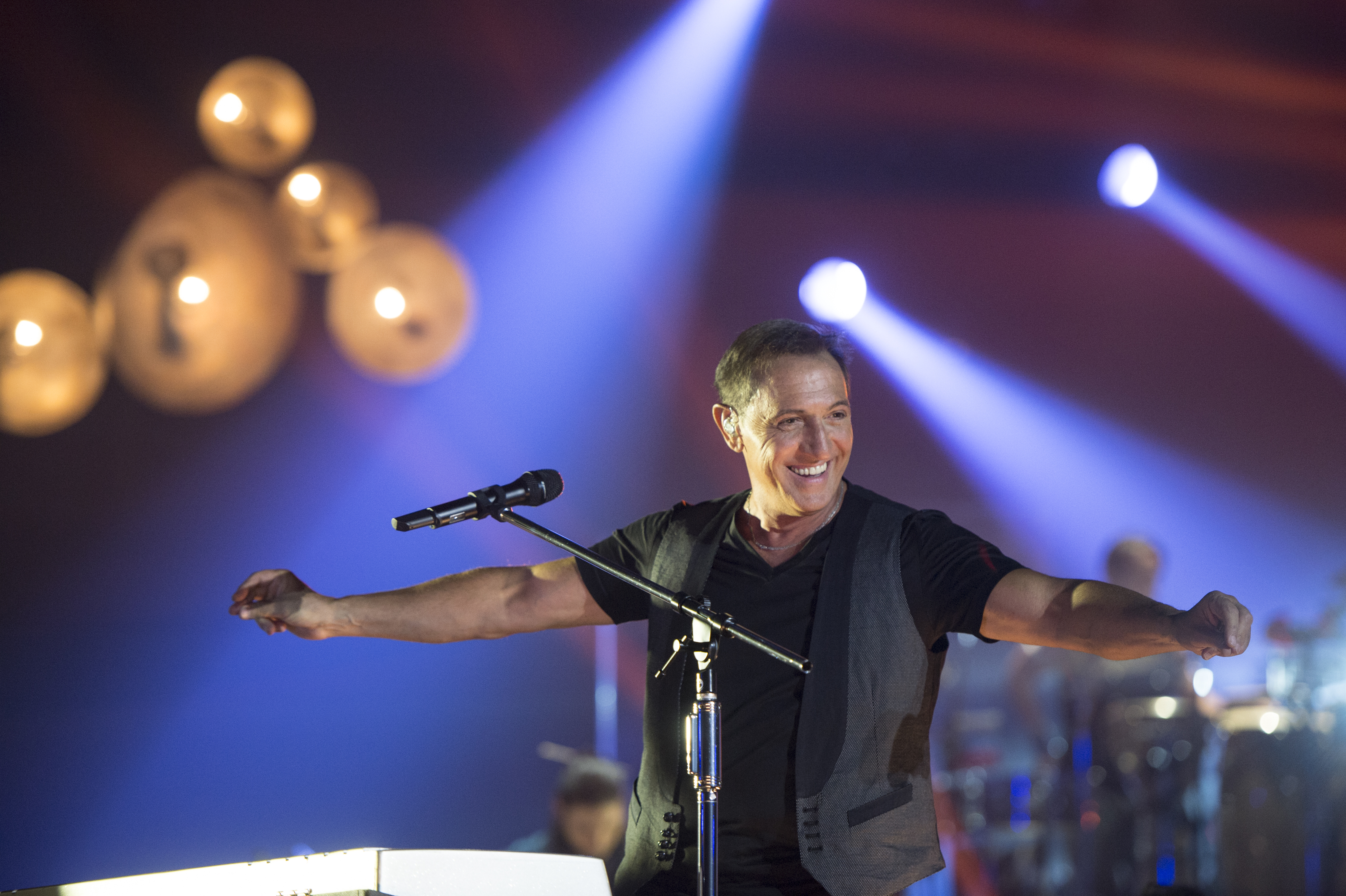 Grabación Estudios Churubusco en México el 10 y 11 de Junio de 2013